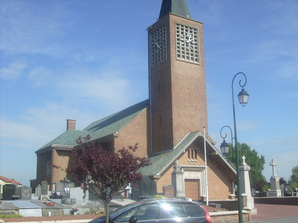 L'église de Coudekerque-Village